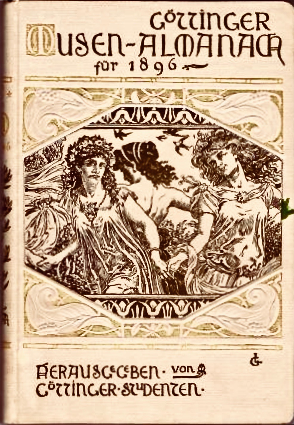 Göttinger Musen-Almanach für 1896. Herausgegeben von Göttinger Studenten, erschienen in Dieterich's Verlagsbuchhandlung, Göttingen 1896.